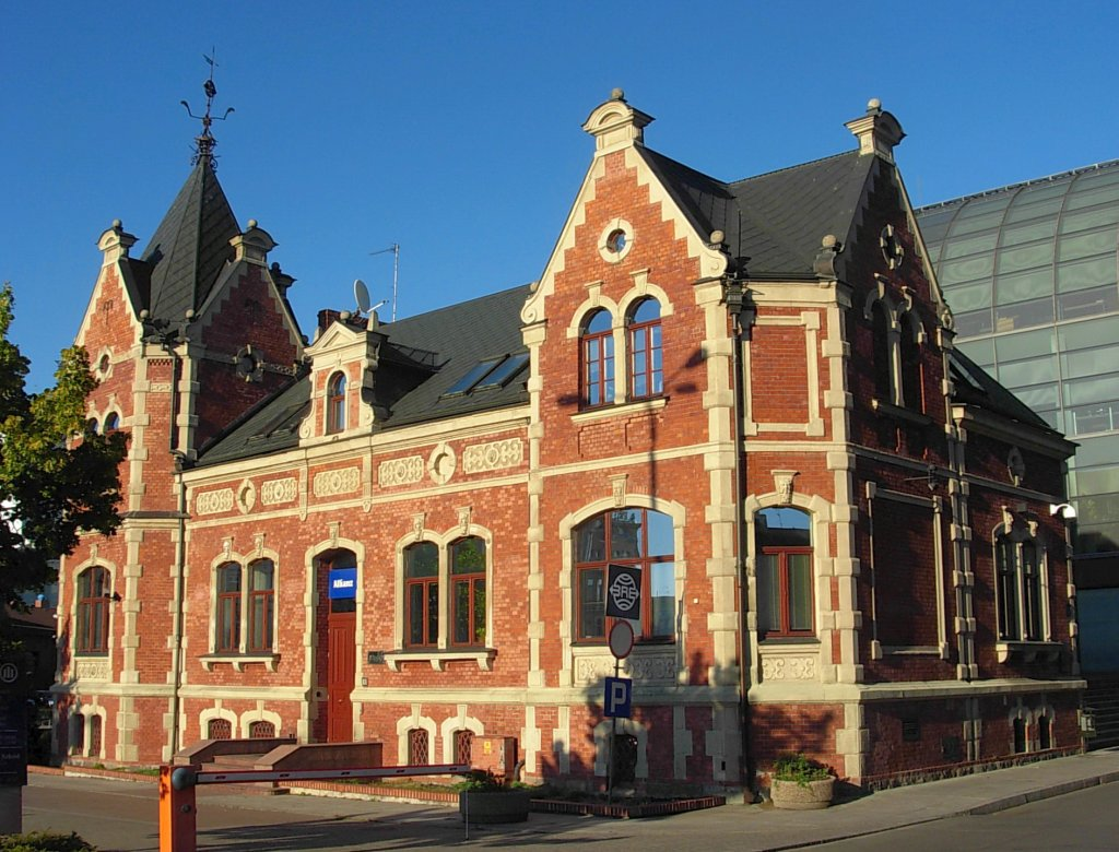 Pałacyk Lloyda w Bydgoszczy